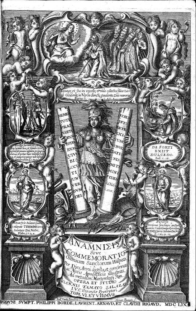 Portada de Juan Tamayo de Salazar, Anamnisis sive Commemoratonis sanctorum hispanorum, impreso en Lyon, 1662, como tomo VI del Martyrologium Hispanum, grabado de Herman Pannels sobre diseño de Antonio van de Pere.